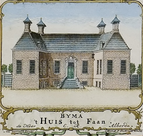 Huis Bijma in Faan. Uitsnede uit de kaart van Theodorus Beckeringh uit 1781